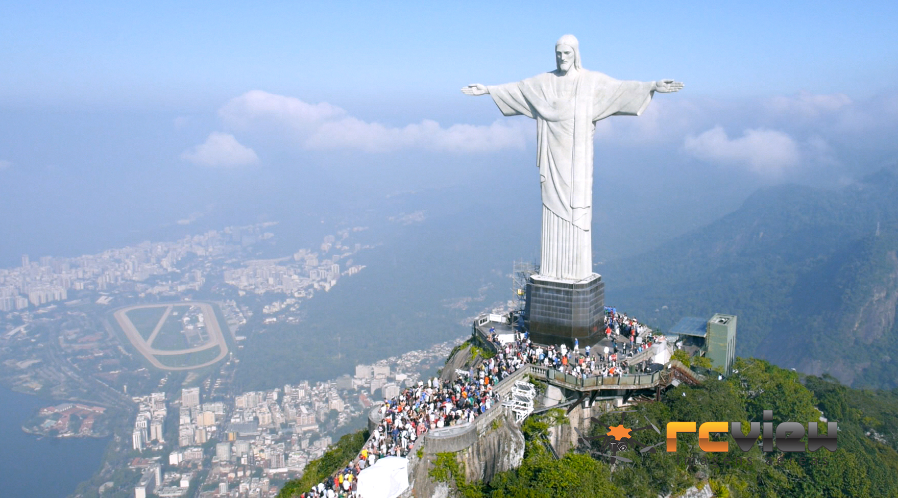 Cristo Redentor - Rio de Janeiro